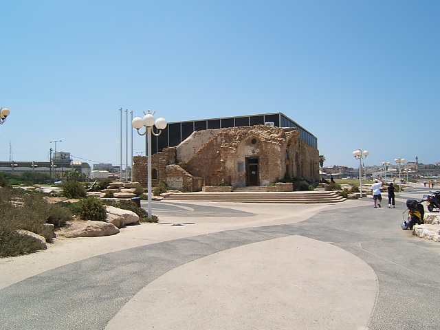 Etzel independence war museum in Clor park in Tel Aviv